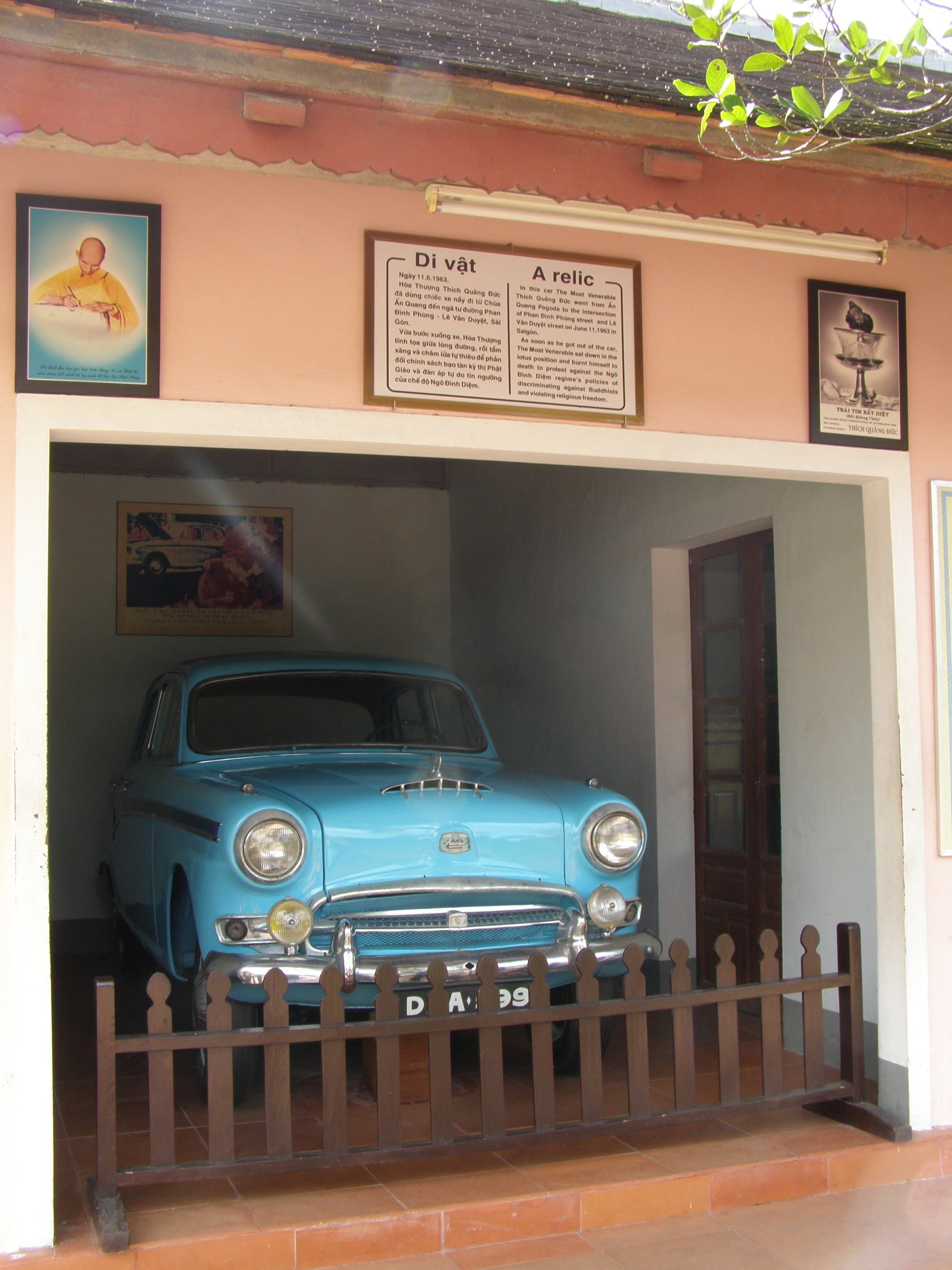 La aŭto de la budhisma monako Thích Quảng Ðức. Thien Mu Pagoda, Hue, Vjetnamio.